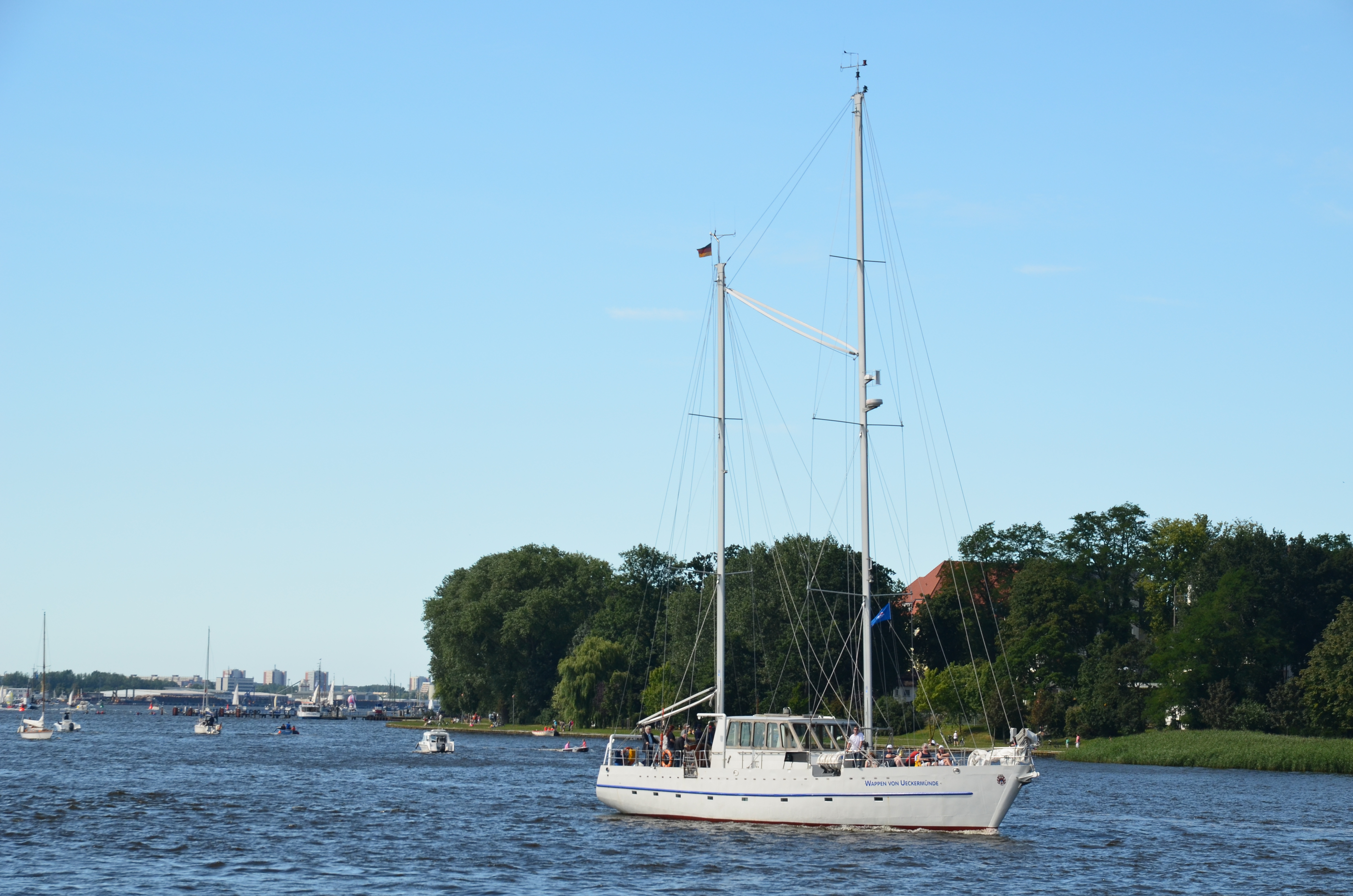 Impressionen von der 22. Hansesail 2012